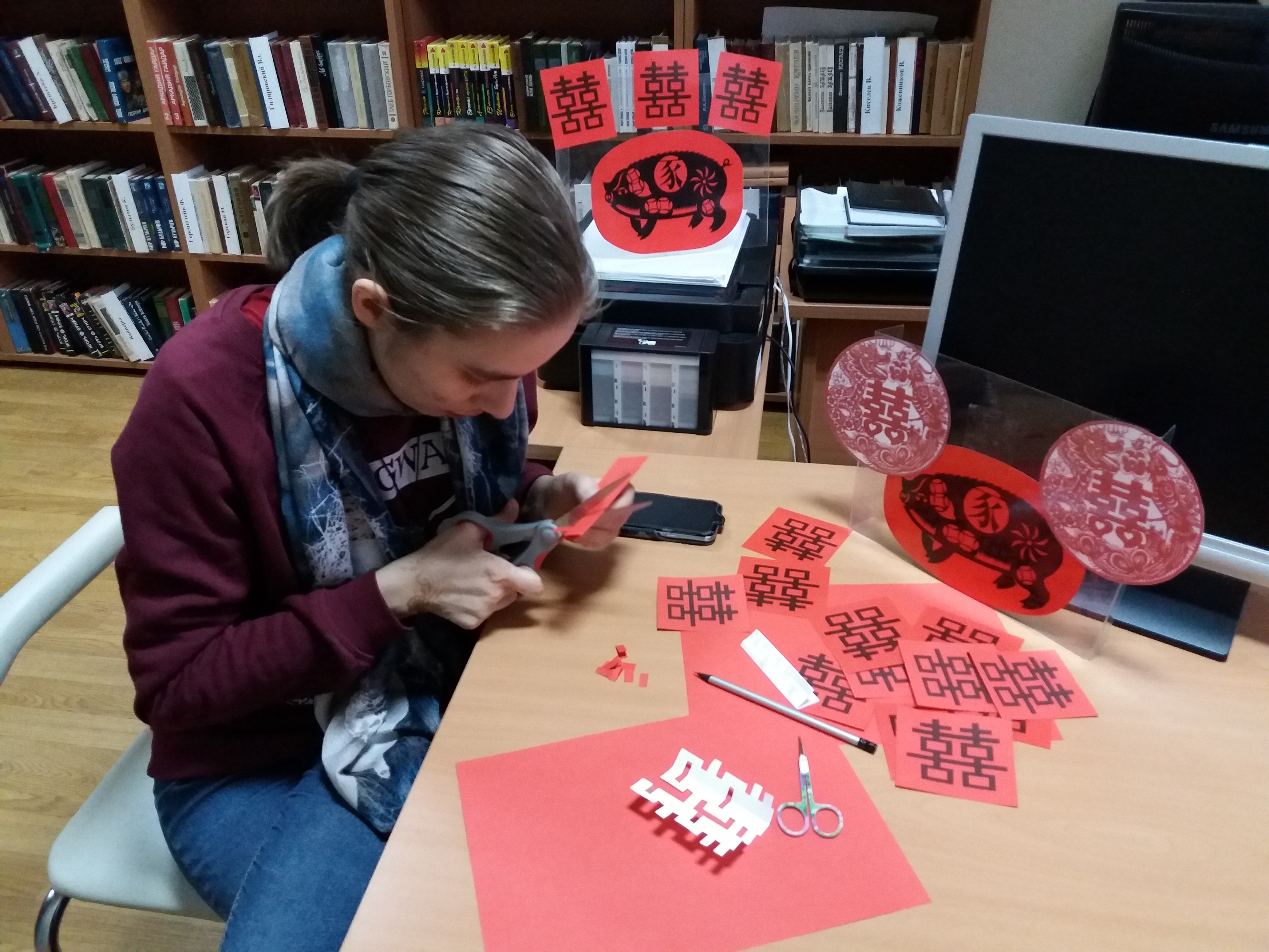 процес вирізання ієрогліфу з червоного паперу